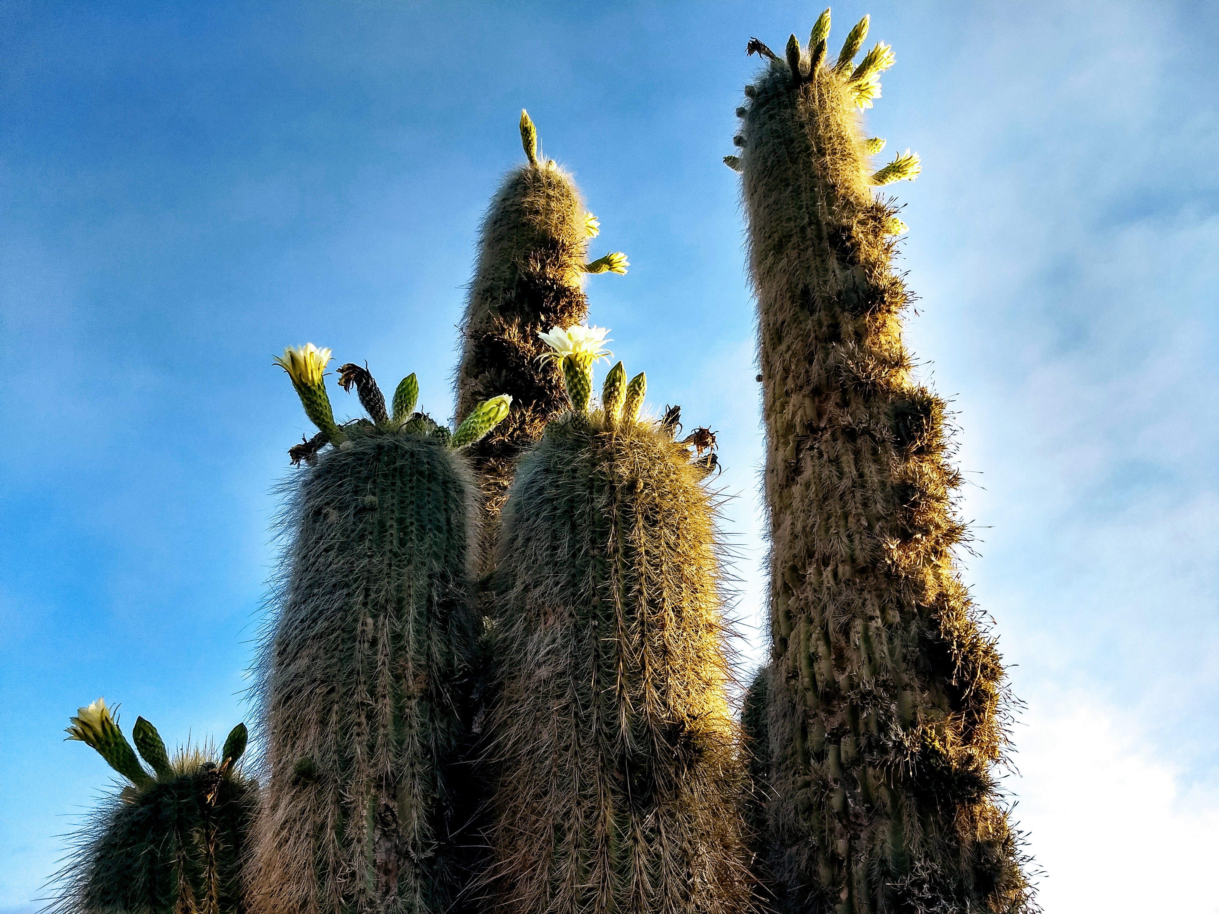 Esta imagen fue tomada desde el mirador aledaño al Monumento a los Héroes de la Independencia.